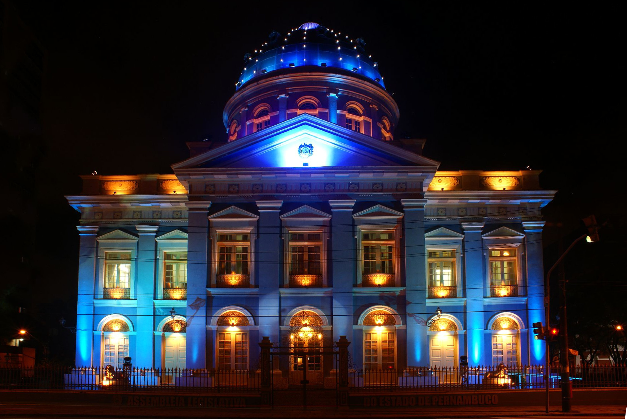 A Rua da Aurora, no Centro do Recife, ganhou um colorido especial na noite É que a Assembléia Legislativa de Pernambuco inaugurou a decoração de Natal da casa. Ao todo, a iluminação conta com 40 canhões de luz com filtros de cor. Os refletores ficarão ligados todos os dias, das 18h à meia-noite, até o dia 6 de janeiro. Na festa de abertura, cerca de 300 pessoas assistiram a show pirotécnico às margens do Rio Capibaribe, além de apresentação da Orquestra Cidadã Meninos do Coque e sete corais. Este ano, a Assembléia foi a primeira dos tradicionais prédios públicos do Recife a lançar a decoração temática.